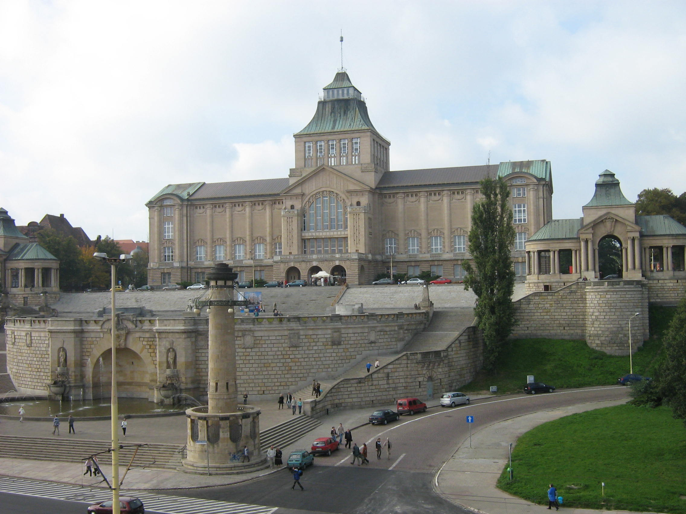 Budynek Muzeum Morskiego oraz Teatru Współczesnego w Szczecinie